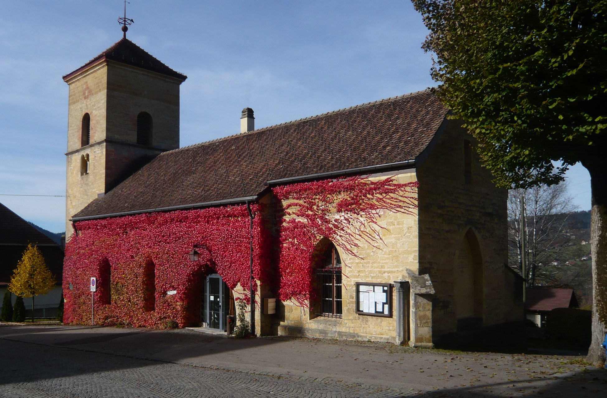 Hôtel communal, siège de l'administration communale. Ancienne église construite en 1511.